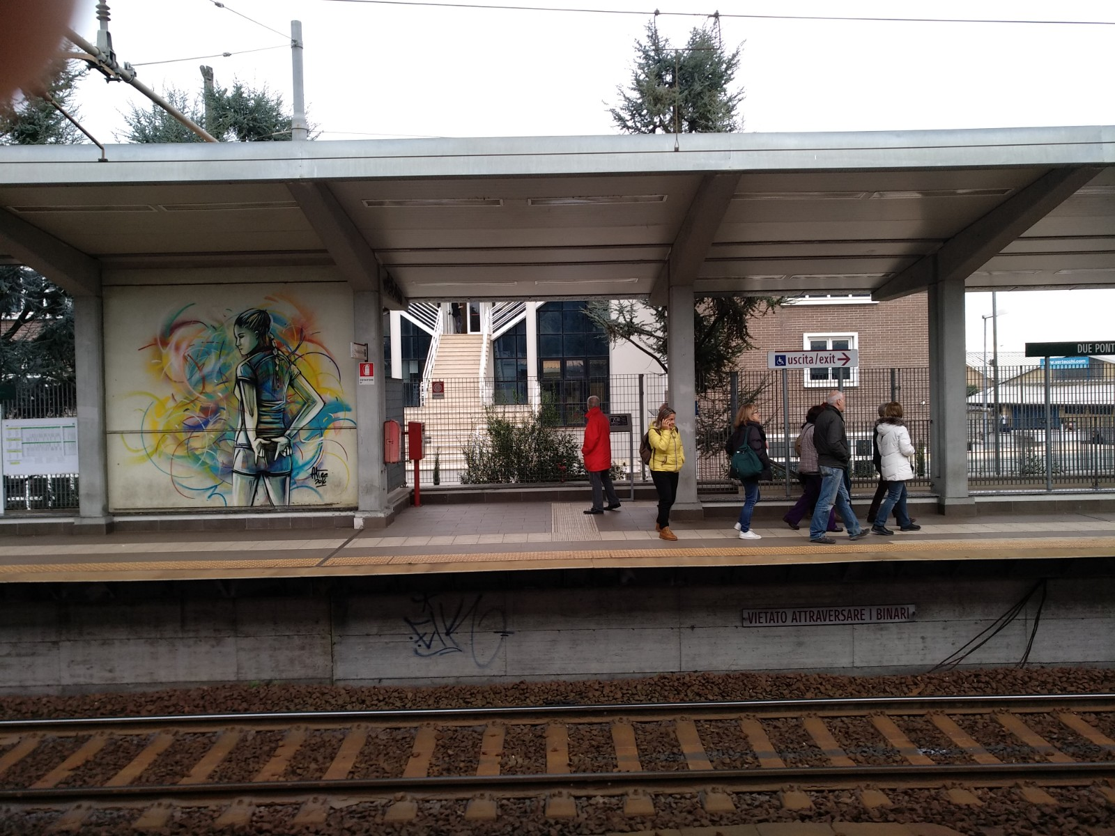 la stazione due ponti, inizio percorso